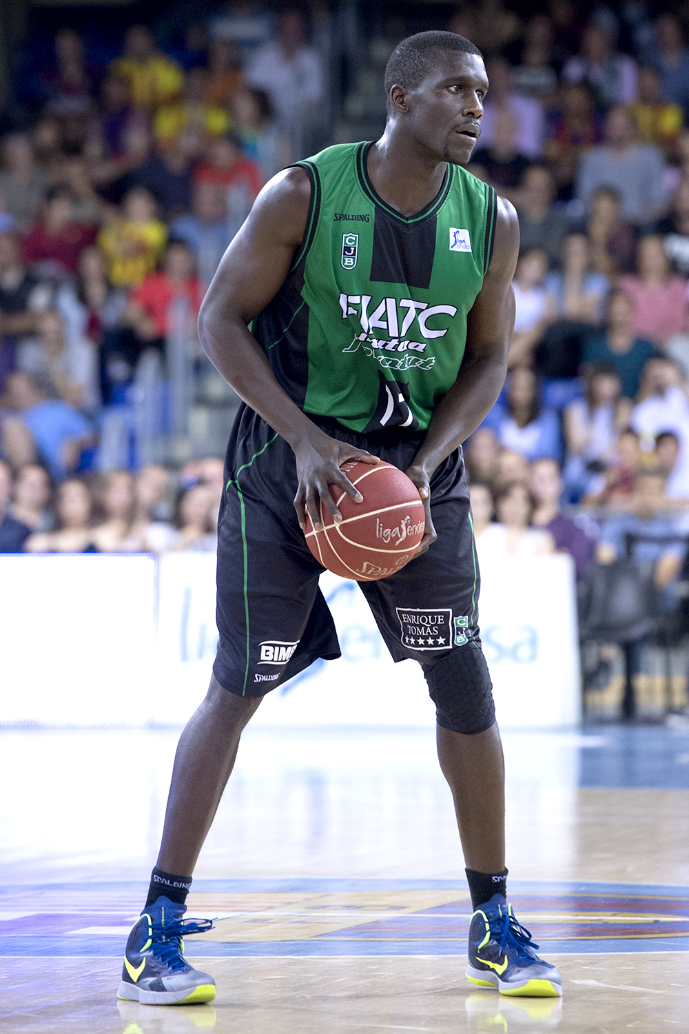 Sitapha Savané en un partit de l'ACB 2014-15 amb el Club Joventut Badalona